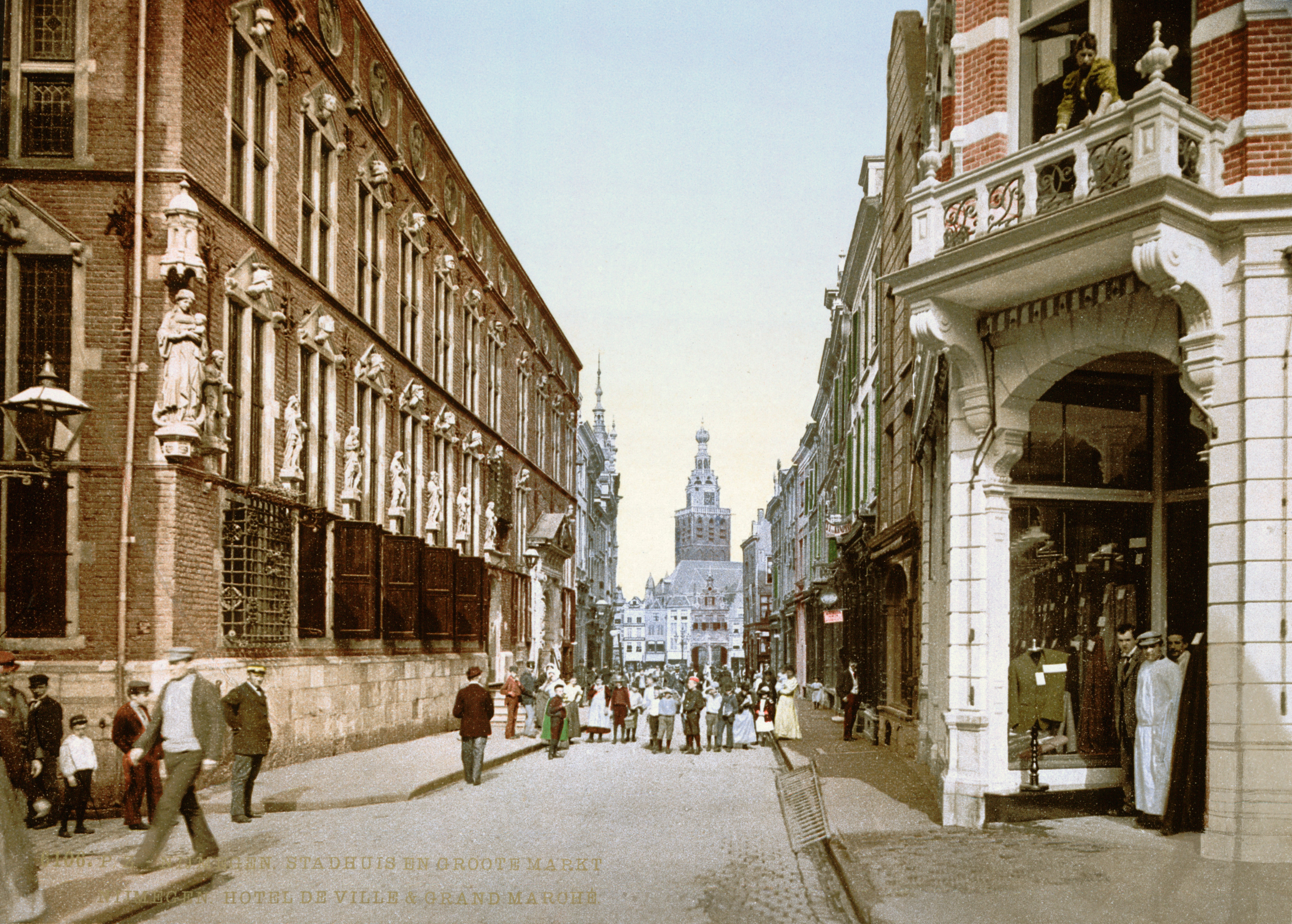 Nijmegen - Stadhuis en Grote Markt